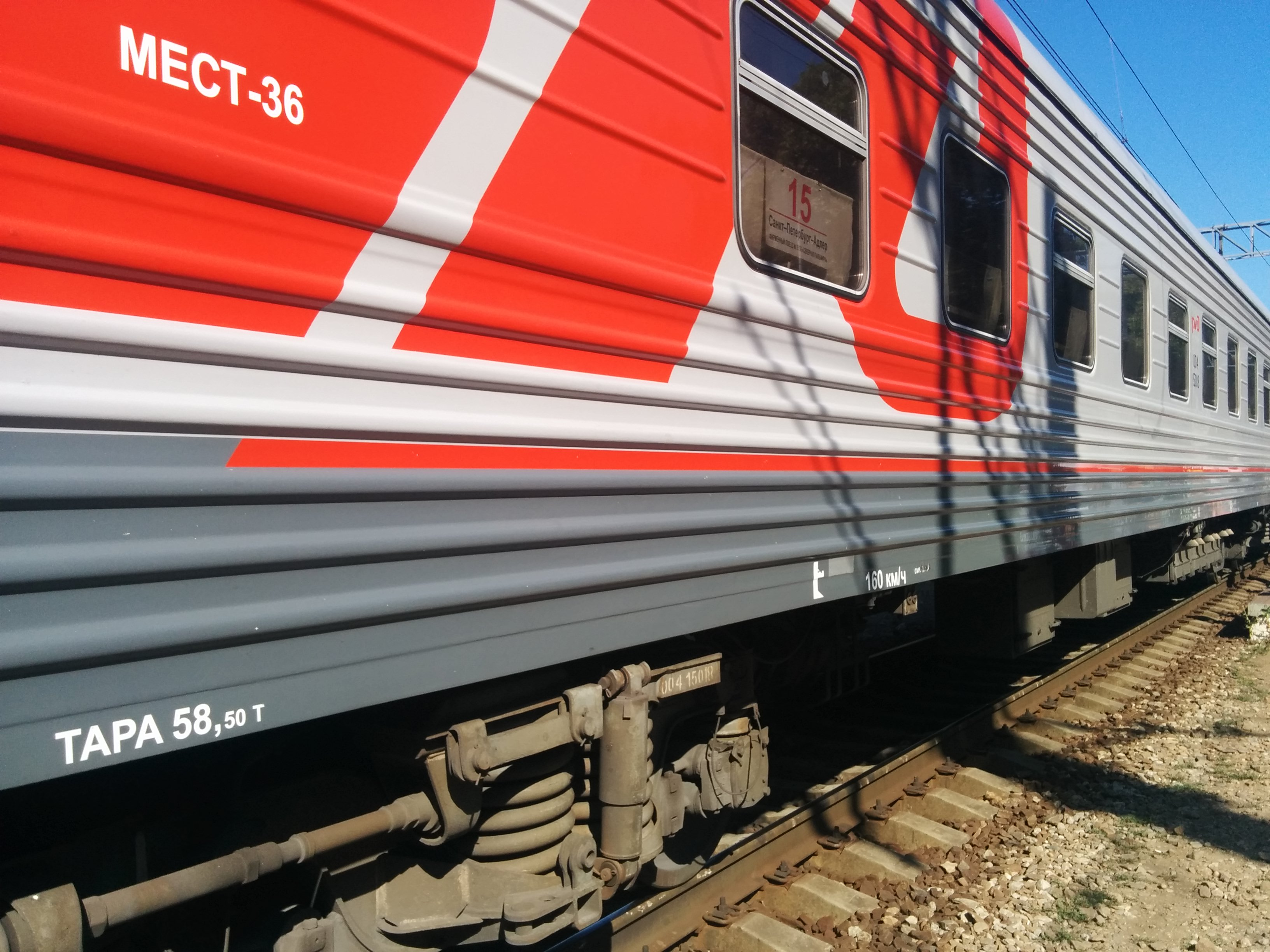 Вагон №15 поезда "Северная Пальмира"